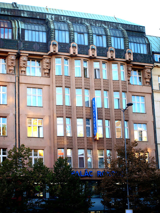 Palác Rokoko na Václavském náměstí